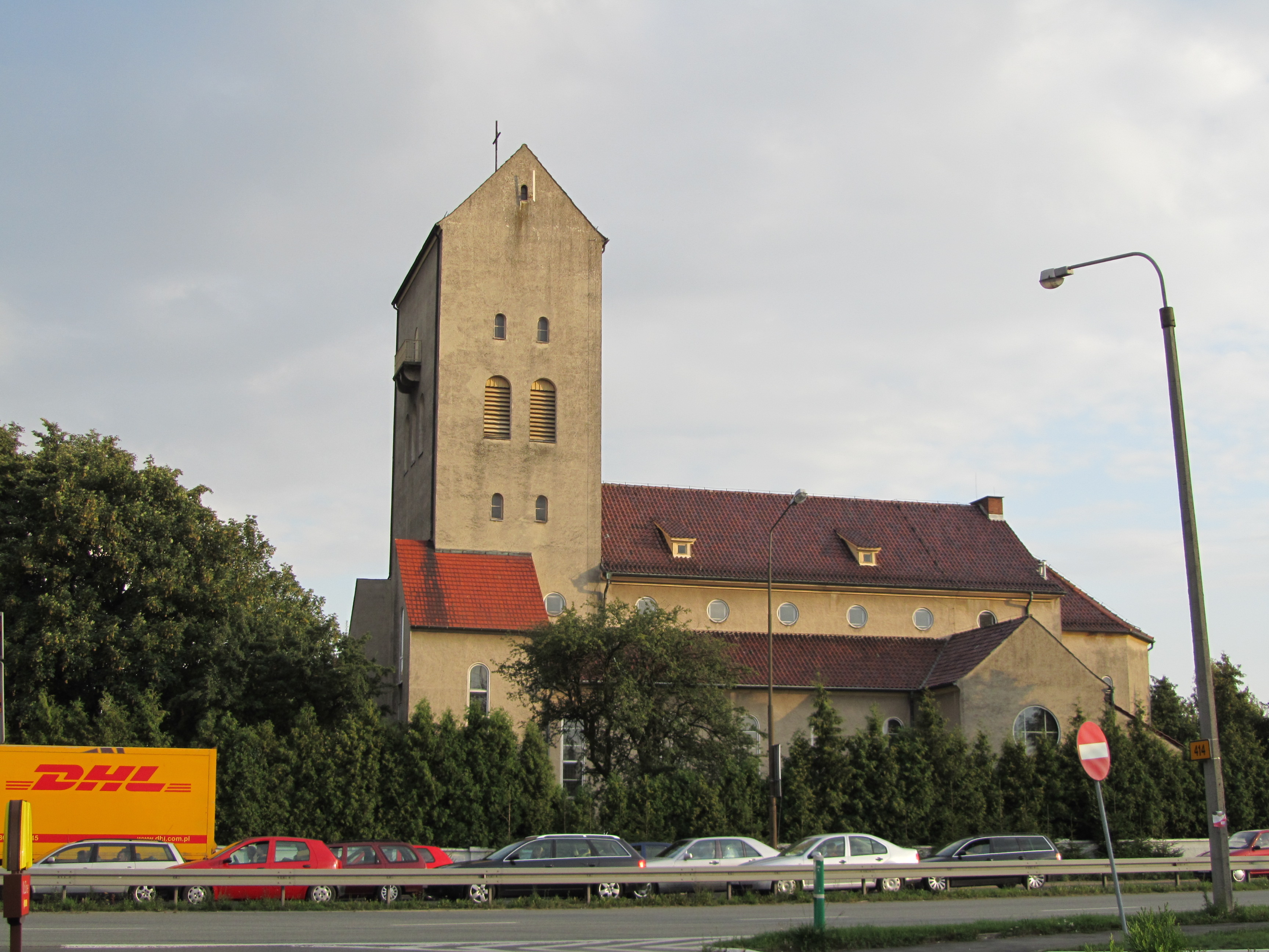 Kirche des heiligen Michaels